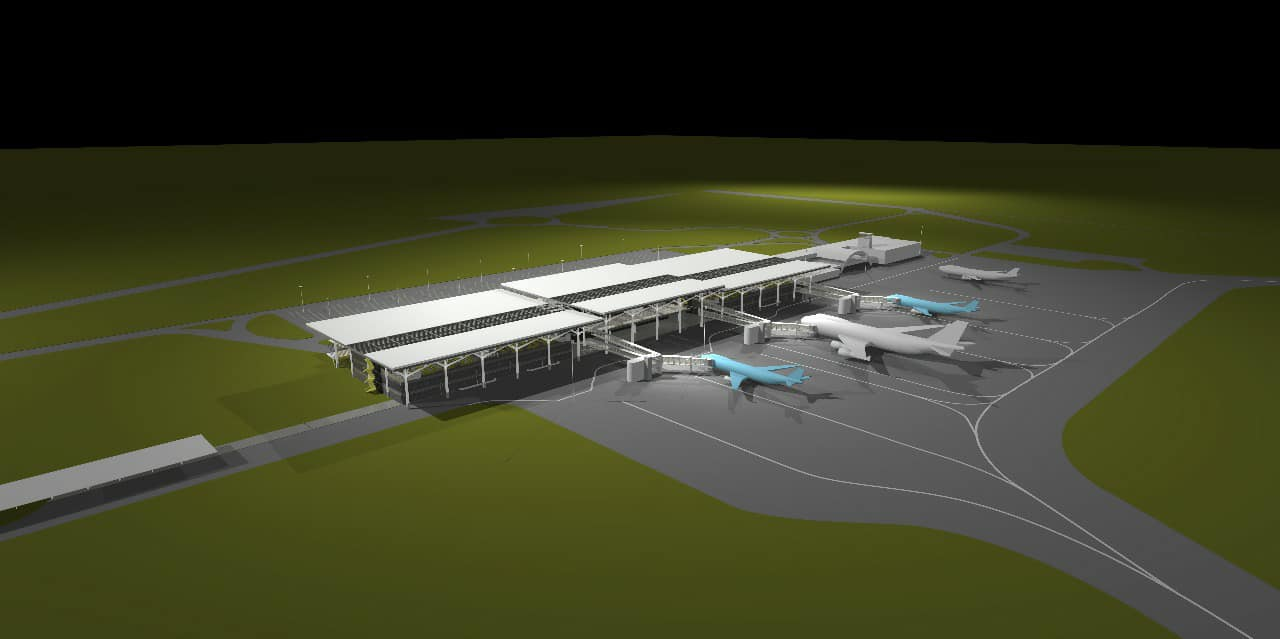 Maqueta del plan de expansión del Aeropuerto Internacional Rosario (Santa Fe, Argentina), previsto para 2020.